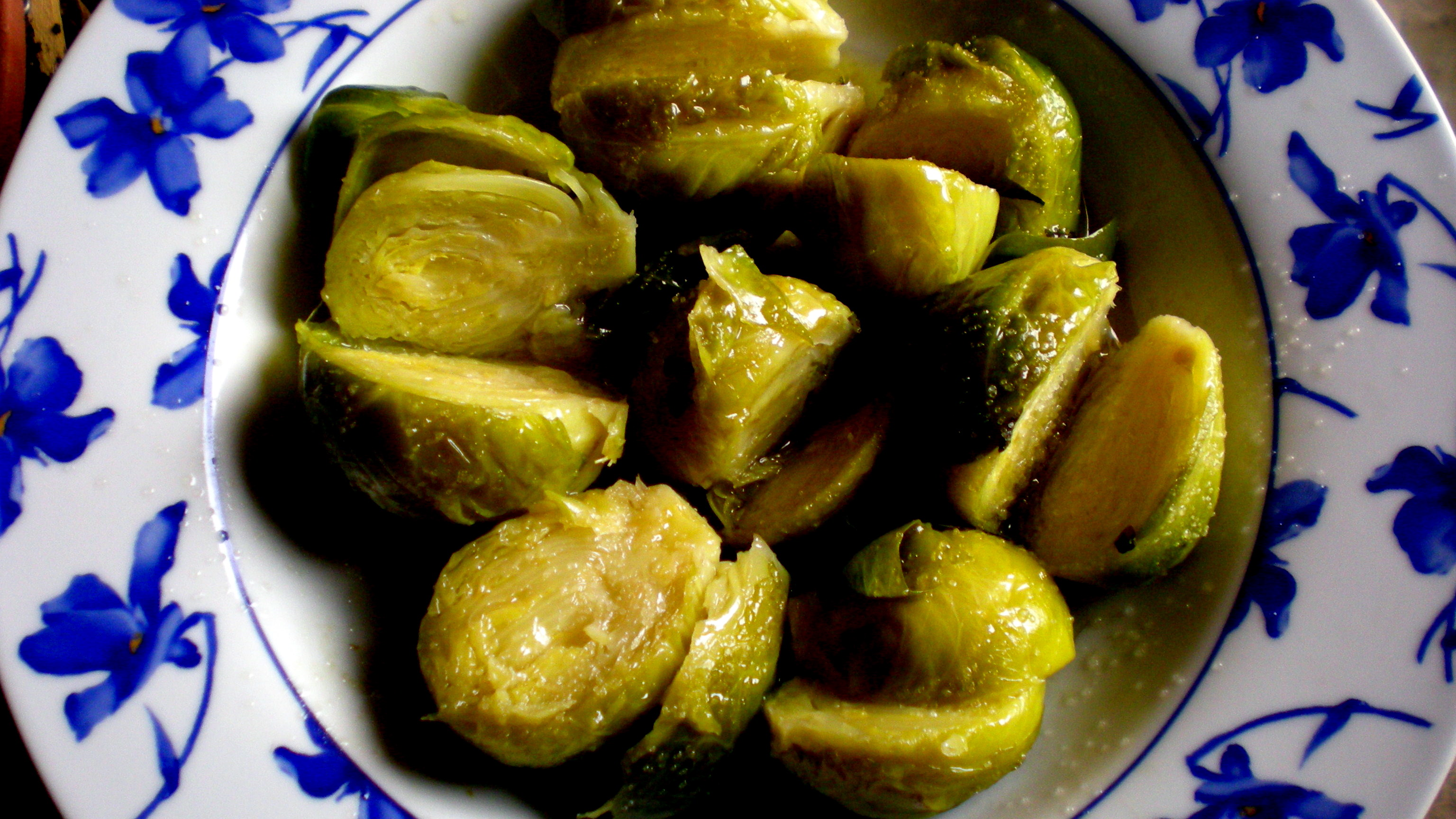 Cols de Brusel·les a la vinagreta de Xerès.